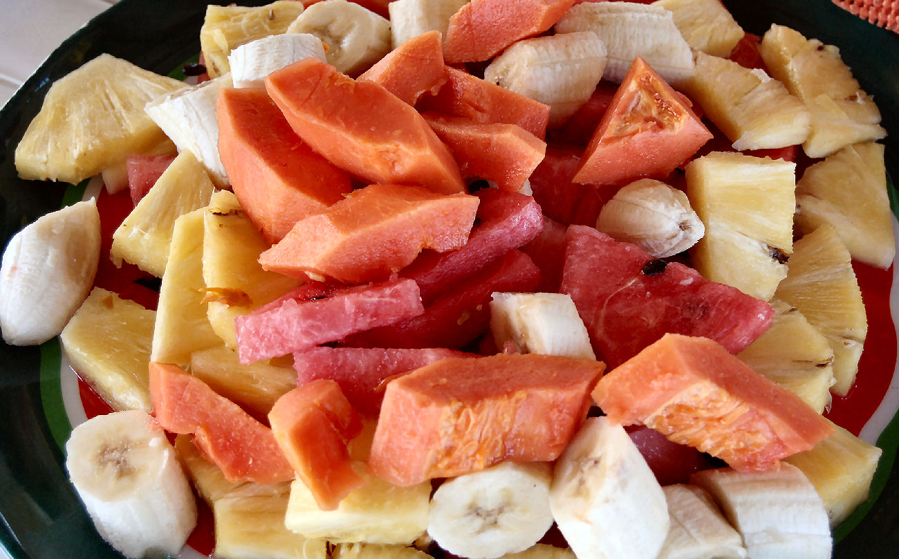 Ensalada de Frutas